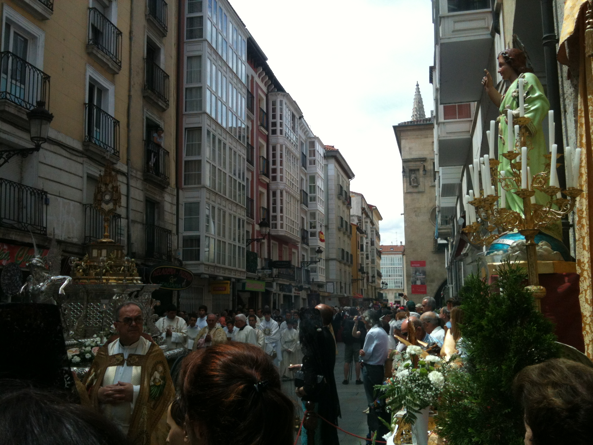 Corpus Christi, Burgos, 2014. La carroza de plata a su paso por el altar del Niño Jesús de la Paloma, en la calle de la Paloma.